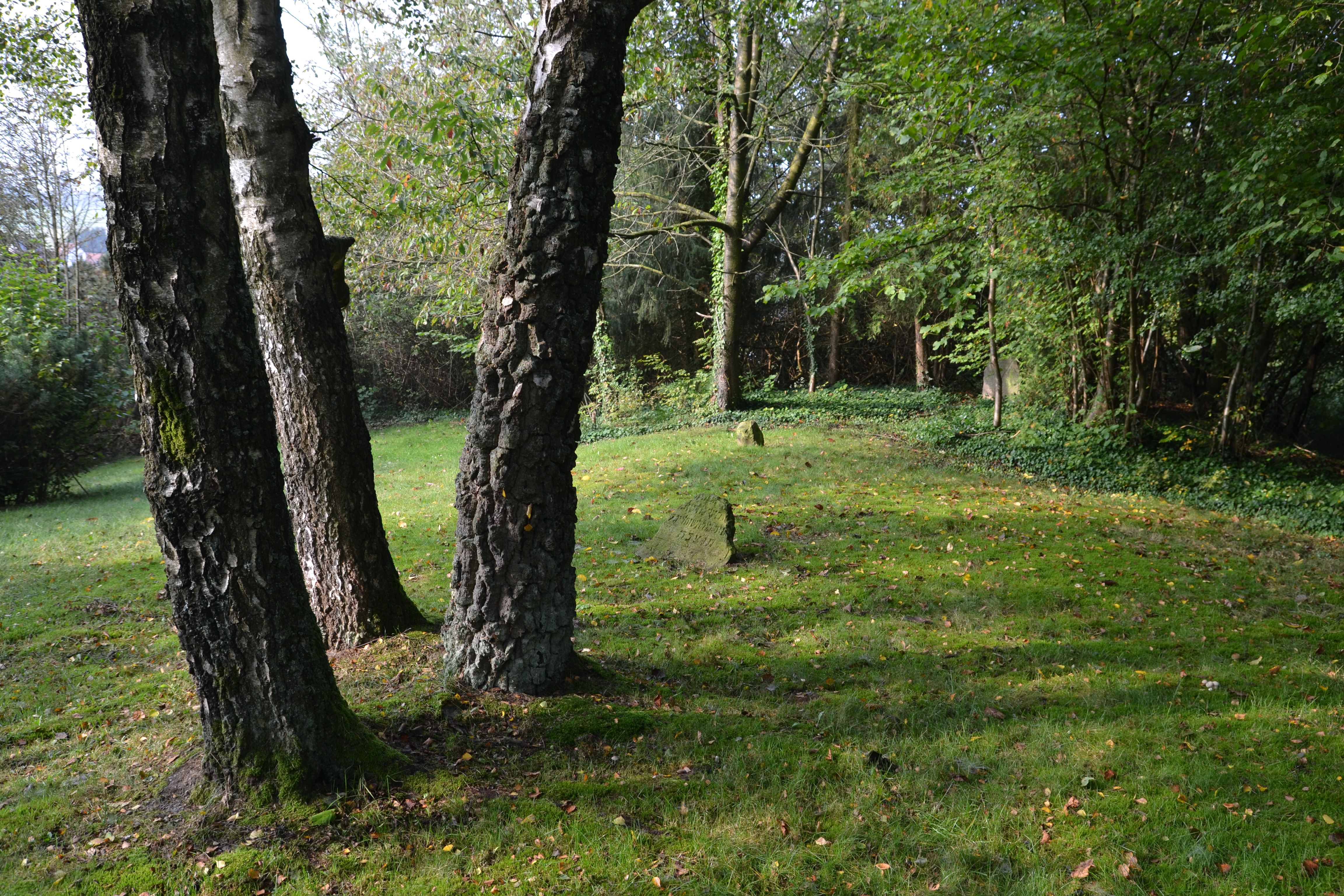 This image shows a heritage building in Germany, located in the North Rhine-Westphalian city Lügde (no. 50). Jüdischer Friedhof Rischenau, nach dem Zweiten Weltkrieg neu angelegt